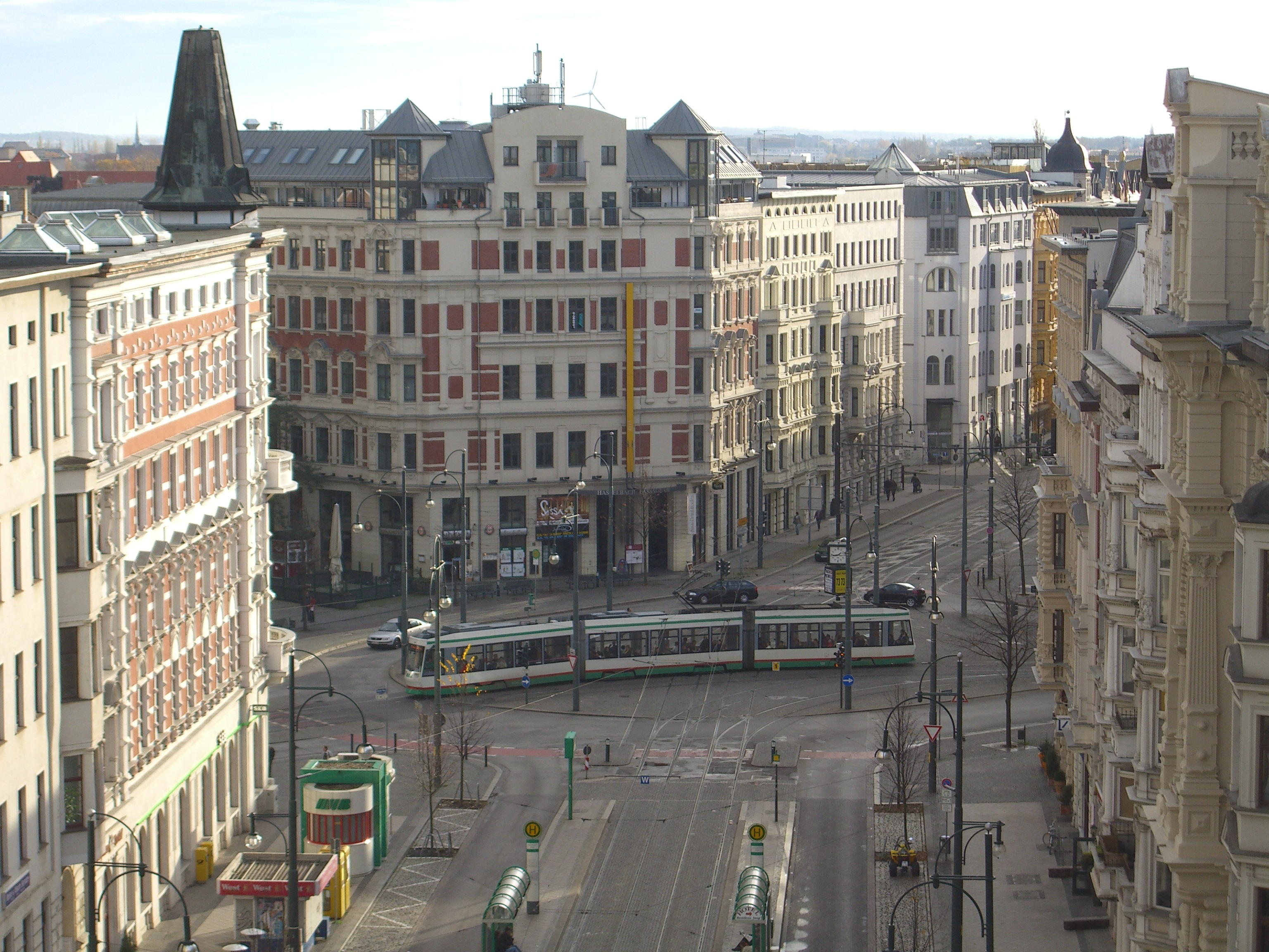 Hasselbachplatz in Magdeburg